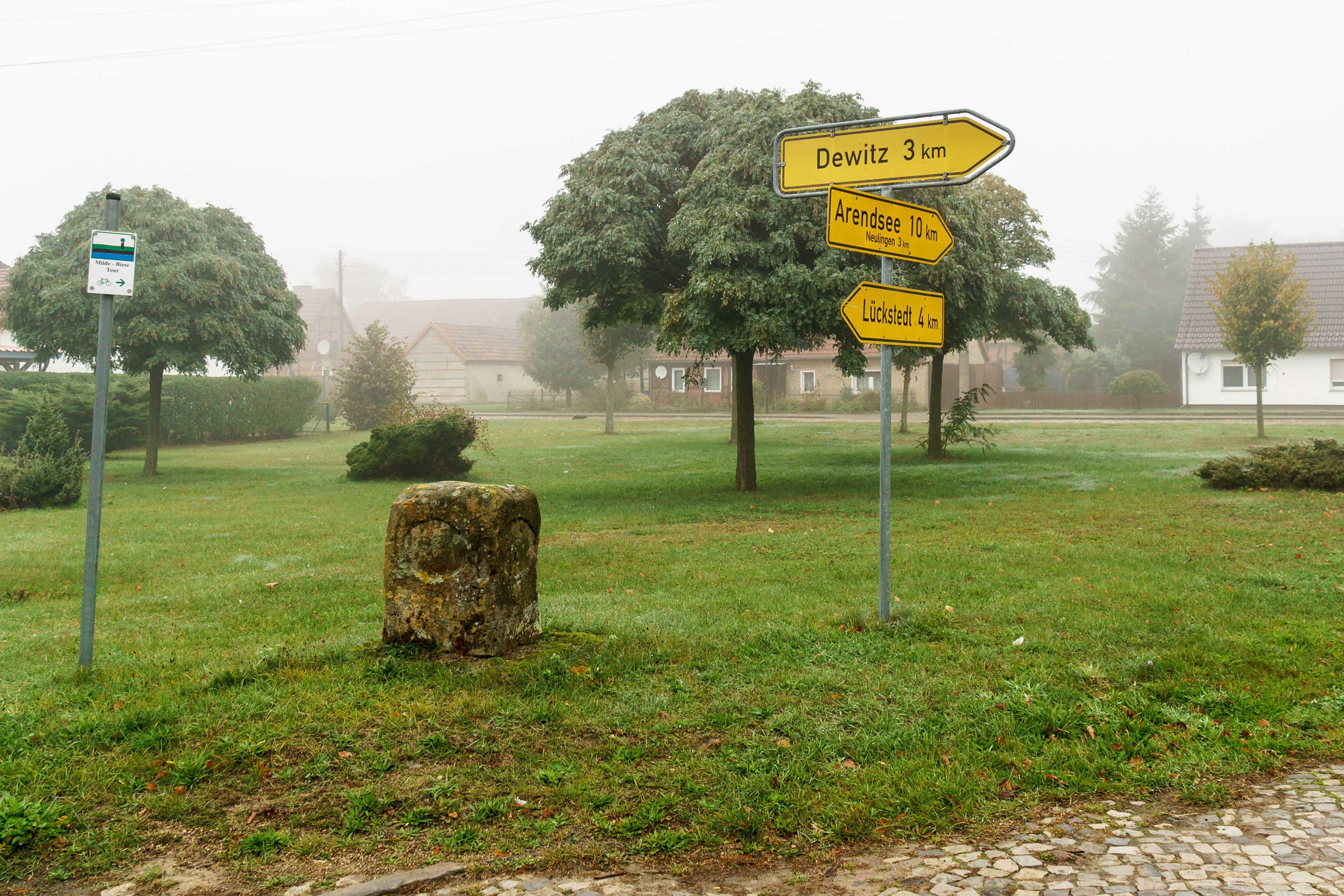 Preußischer Viertelmeilenwürfel (0302) in Gagel